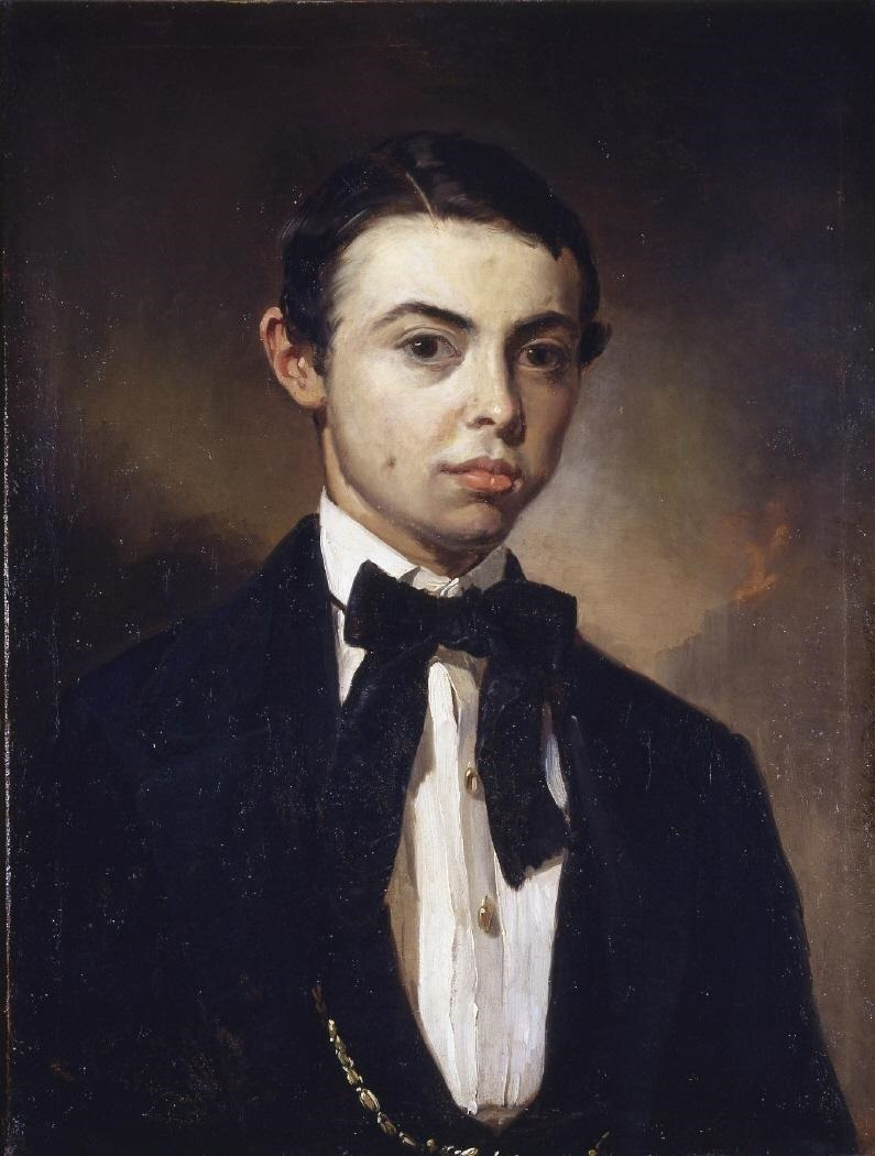 Retrato del periodista, dramaturgo y novelista español Julio Nombela Tabares (1836-1919).